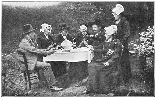 "Auvergnaten aan het middagmaal"